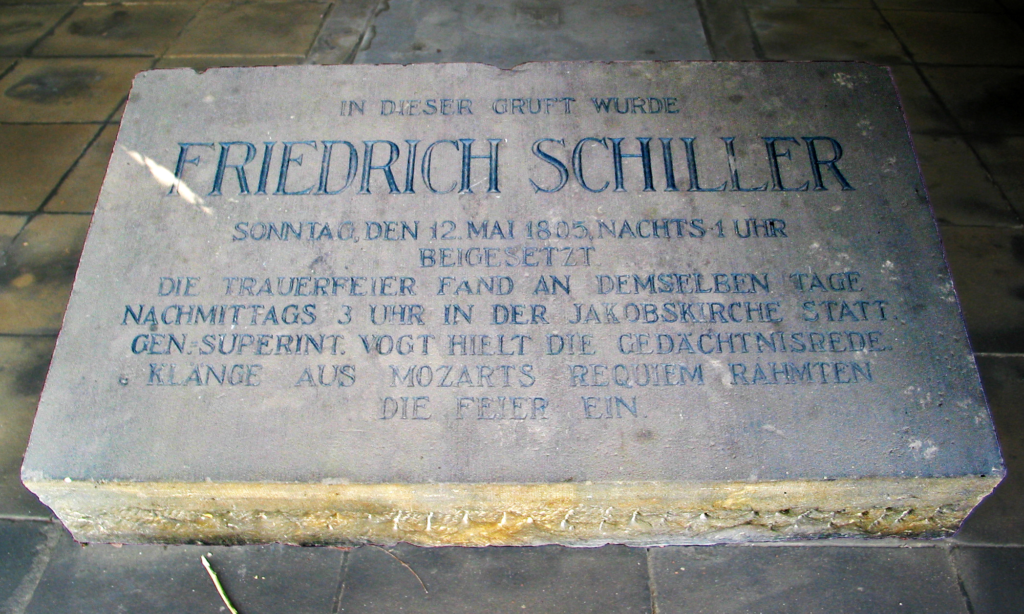 Grabstein im Kassengewölbe (Schillergruft) auf dem Jakobskirchhof in Weimar.